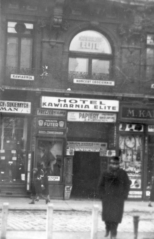 вулиця Огієнка